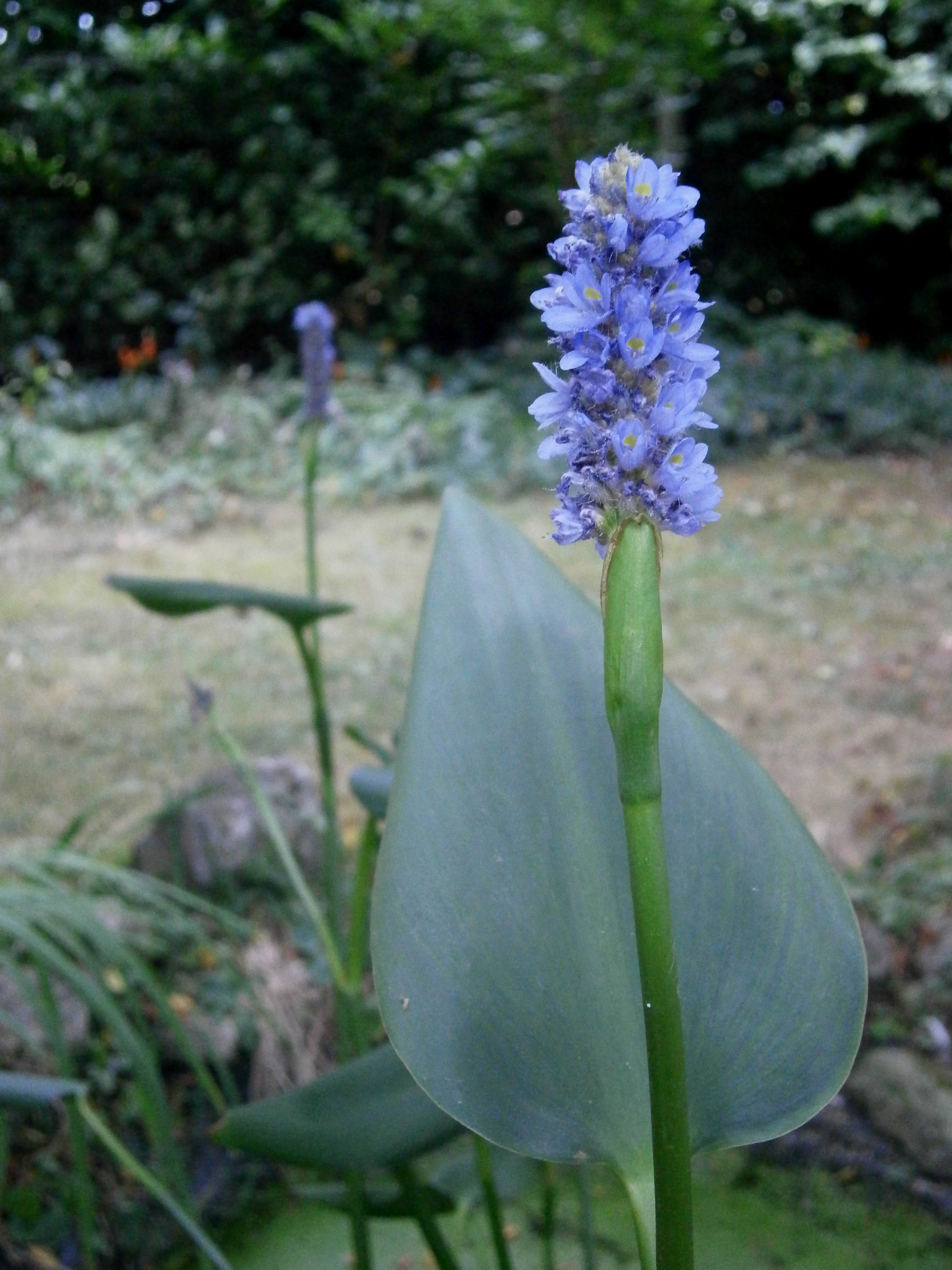 Pontederia sagittata inflorescence